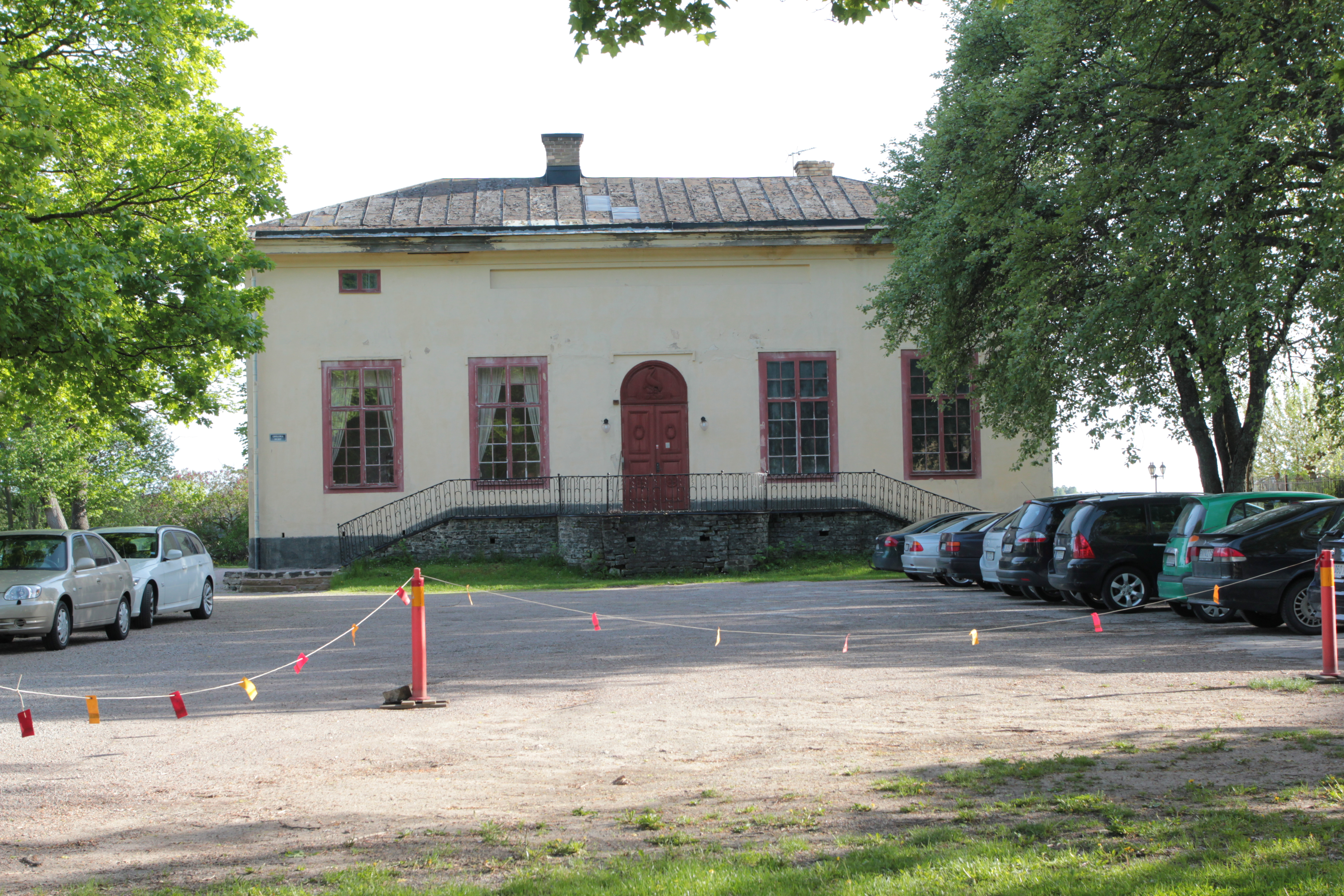 Grillska huset, Söderfors bruk. Foto uppladdat som en del i Bergslagssafarin 26 maj 2012.